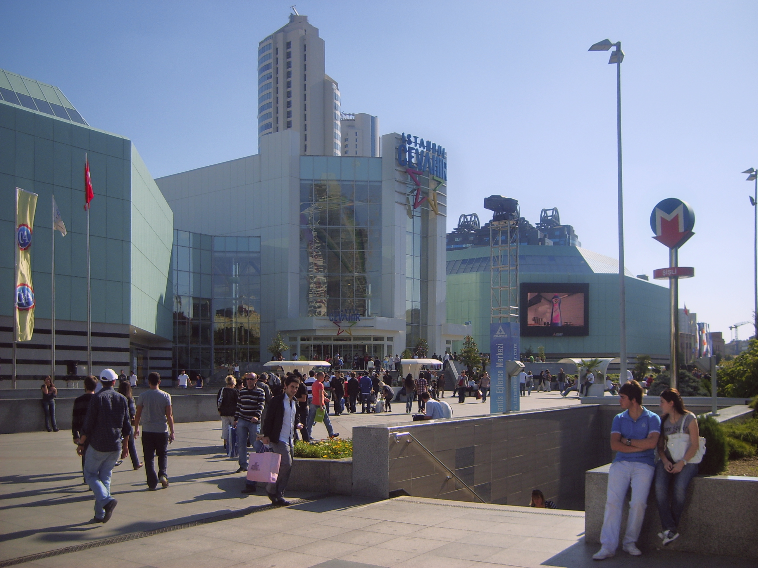 Istanbul Metrosu Şişli istasyonu Fulya girişi